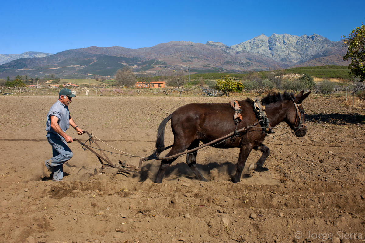 Arando con mula los campos para plantar pimientos para la elaboración de Pimentón de Candeleda